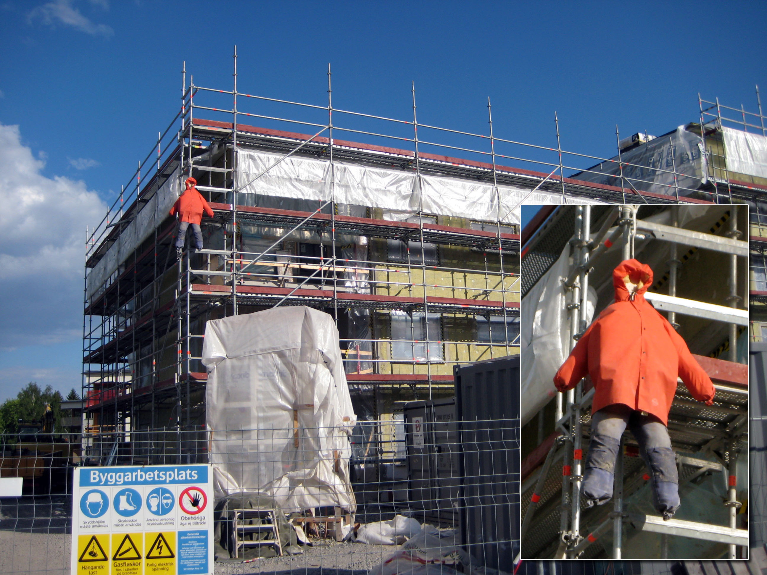 Långbro (stockholm) fd sjukhem omr. Utebliven taklagsfest, docka i nocken